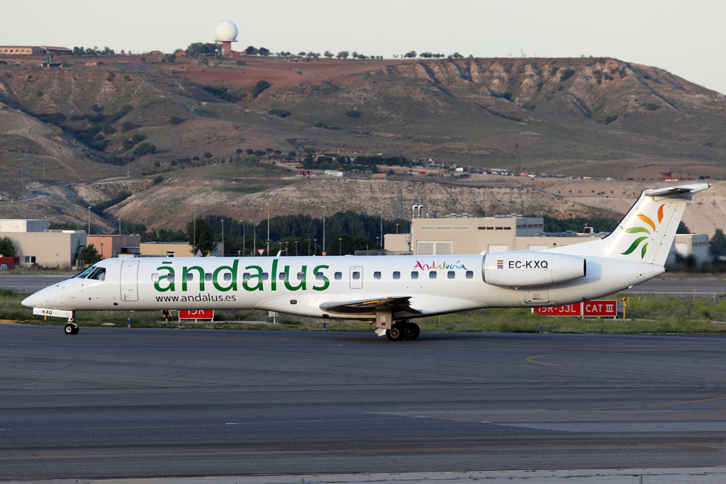 EC-KXQ Erj145EU Andalus Líneas Aéreas